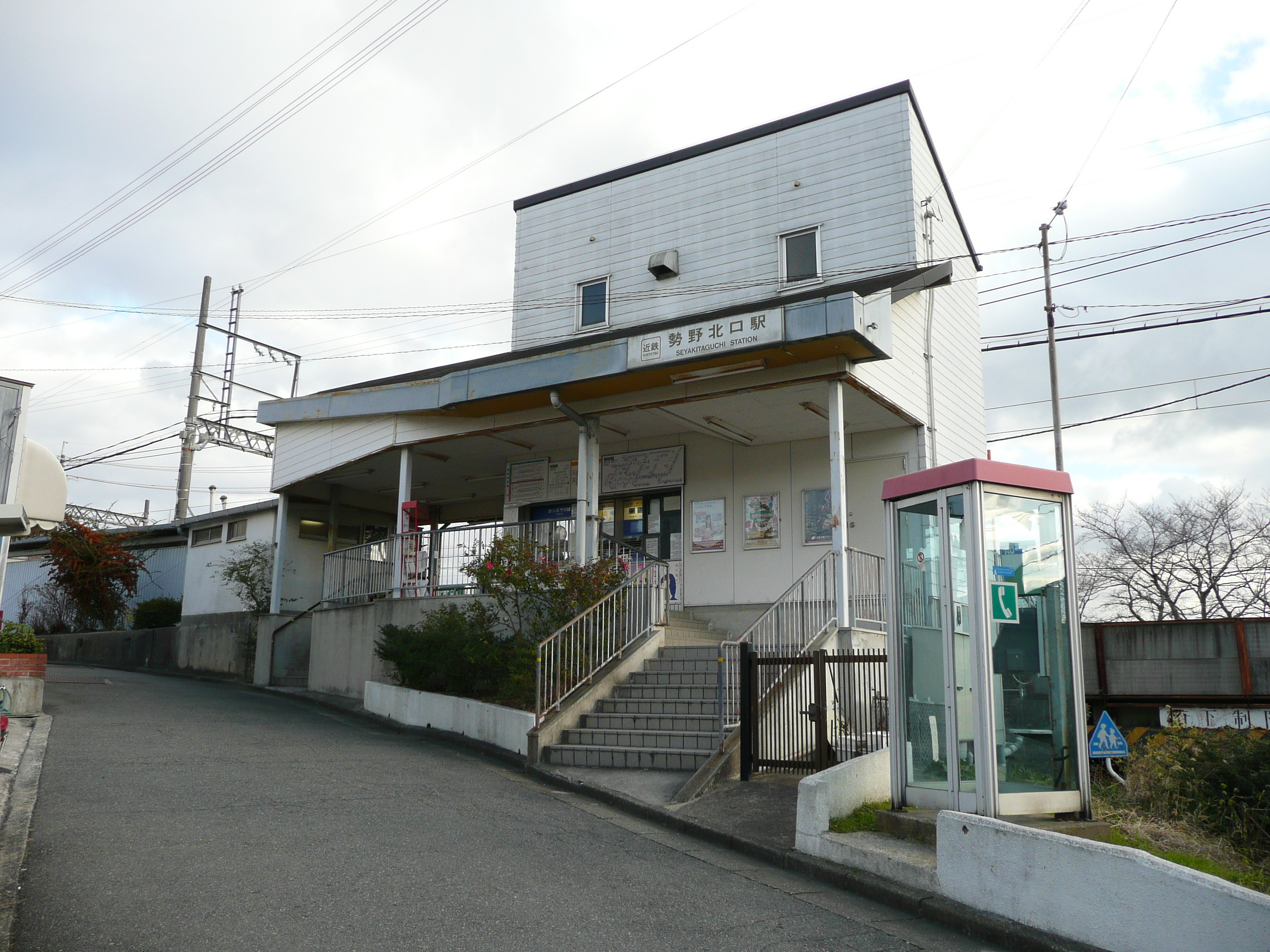 Kinki Nippon Railway,Ikoma Line,Seyakitaguchi Station. /近鉄生駒線勢野北口駅